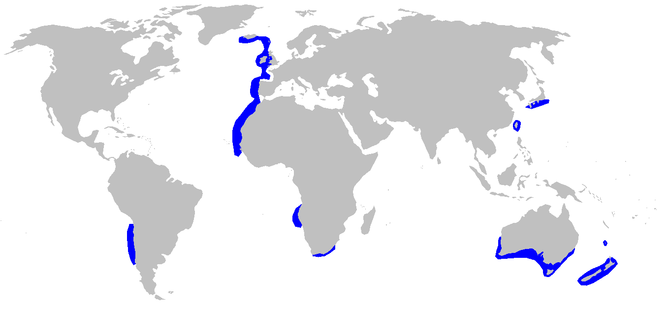 Distribution map for Deania calcea